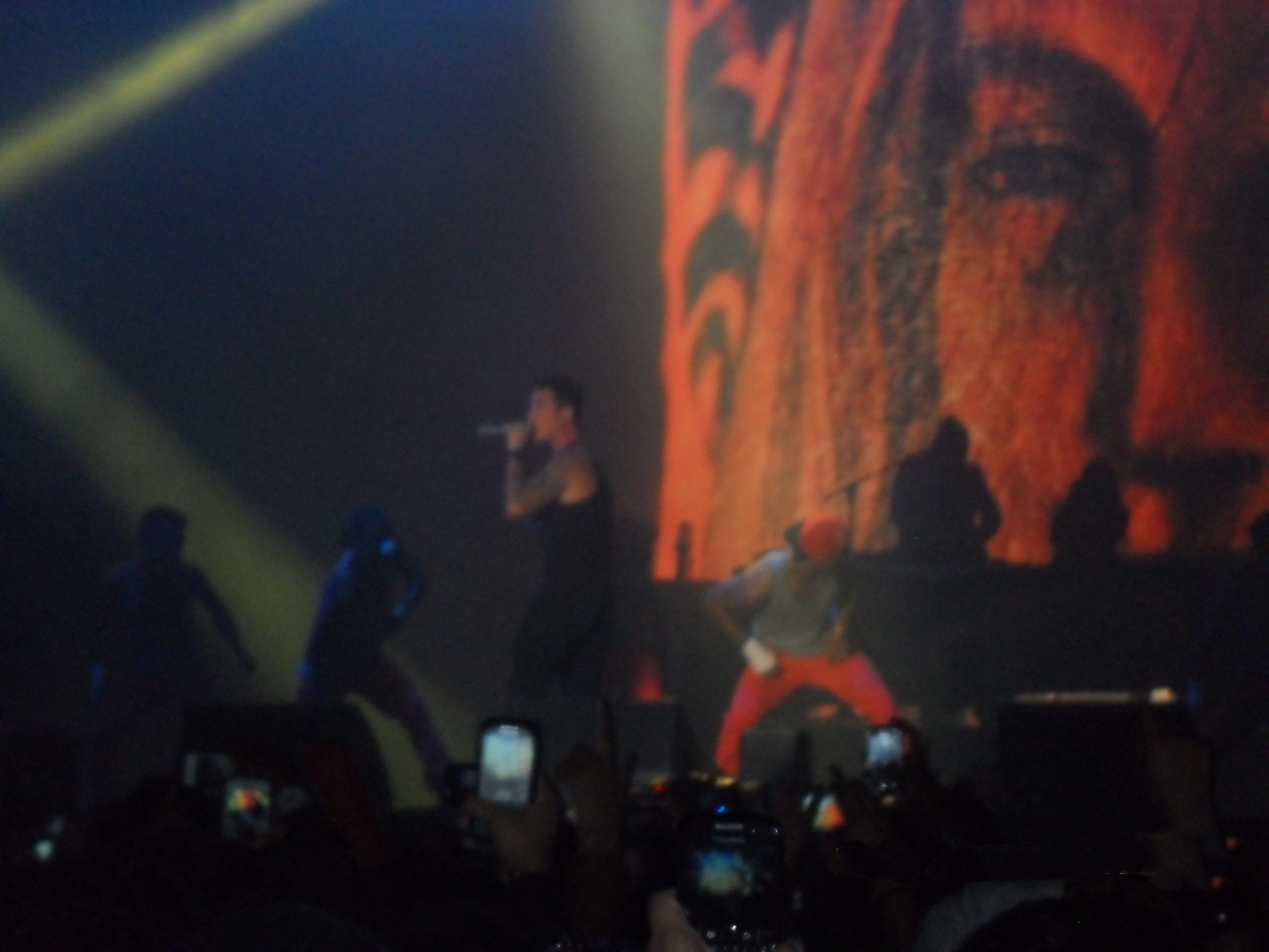 J en vivo